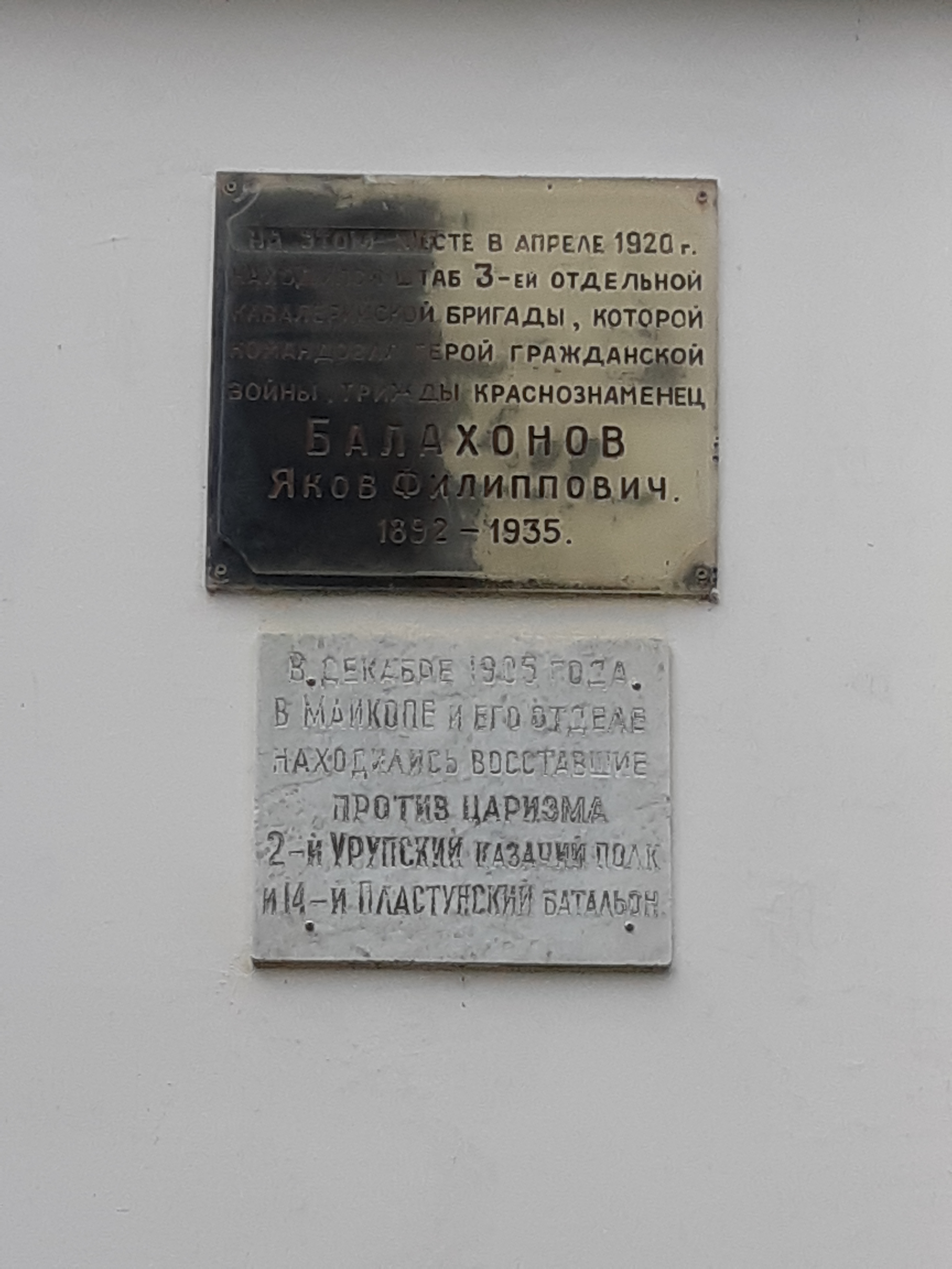 Здание, где располагался штаб 3-й отдельной кавалерийской бригады под командованием Я.Ф. Балахонова: улица Пионерская, 268, Майкоп, Адыгея